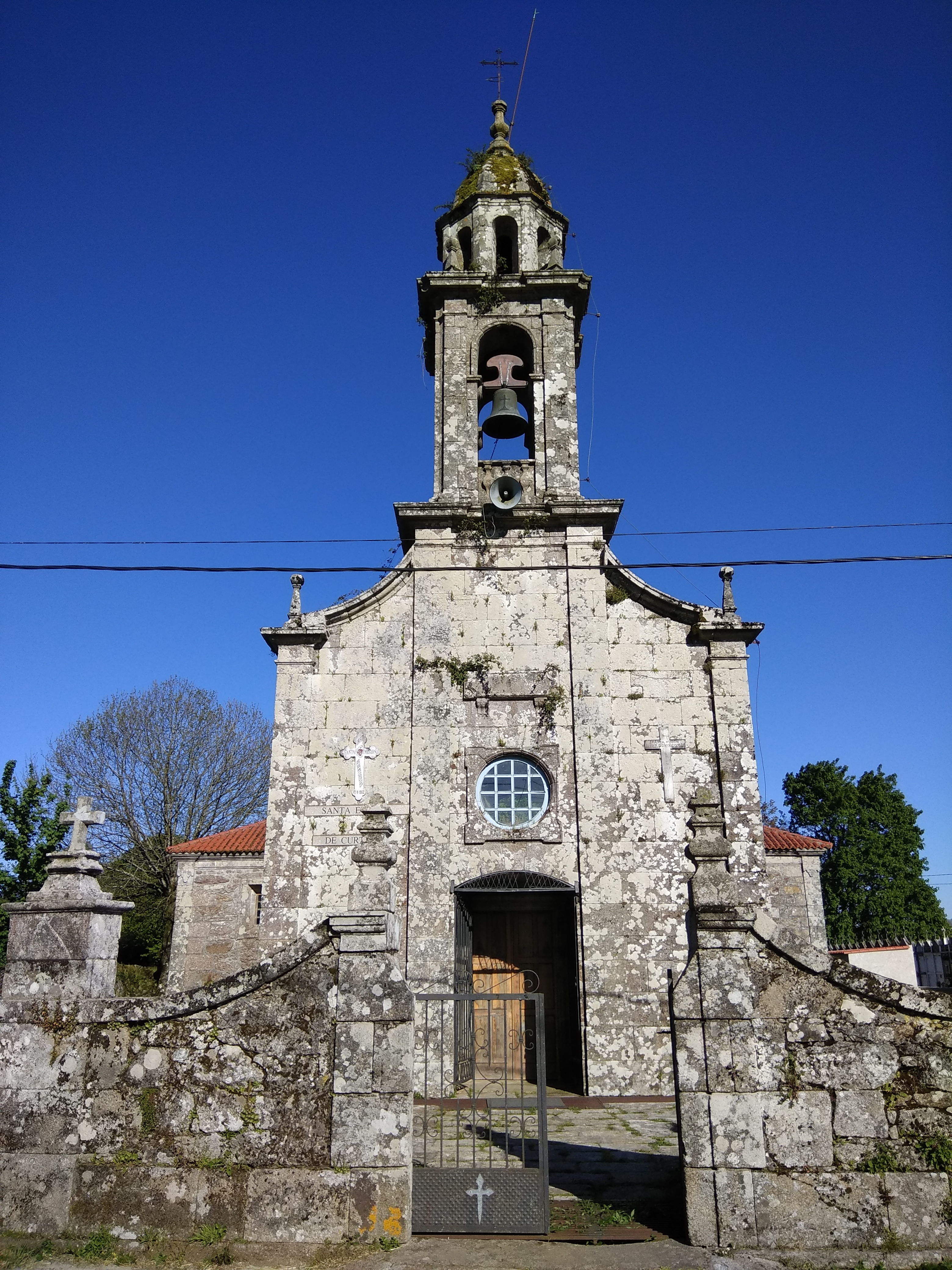 Igrexa de Santaia de Curtis (Curtis, Galiza).